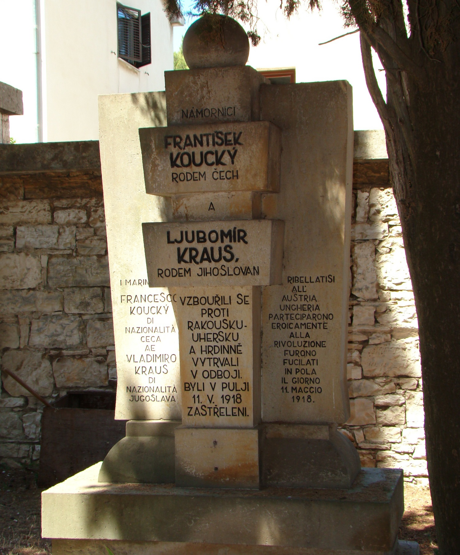 Strijeljani revolucionari pokopani na mornaričkome groblju u Puli